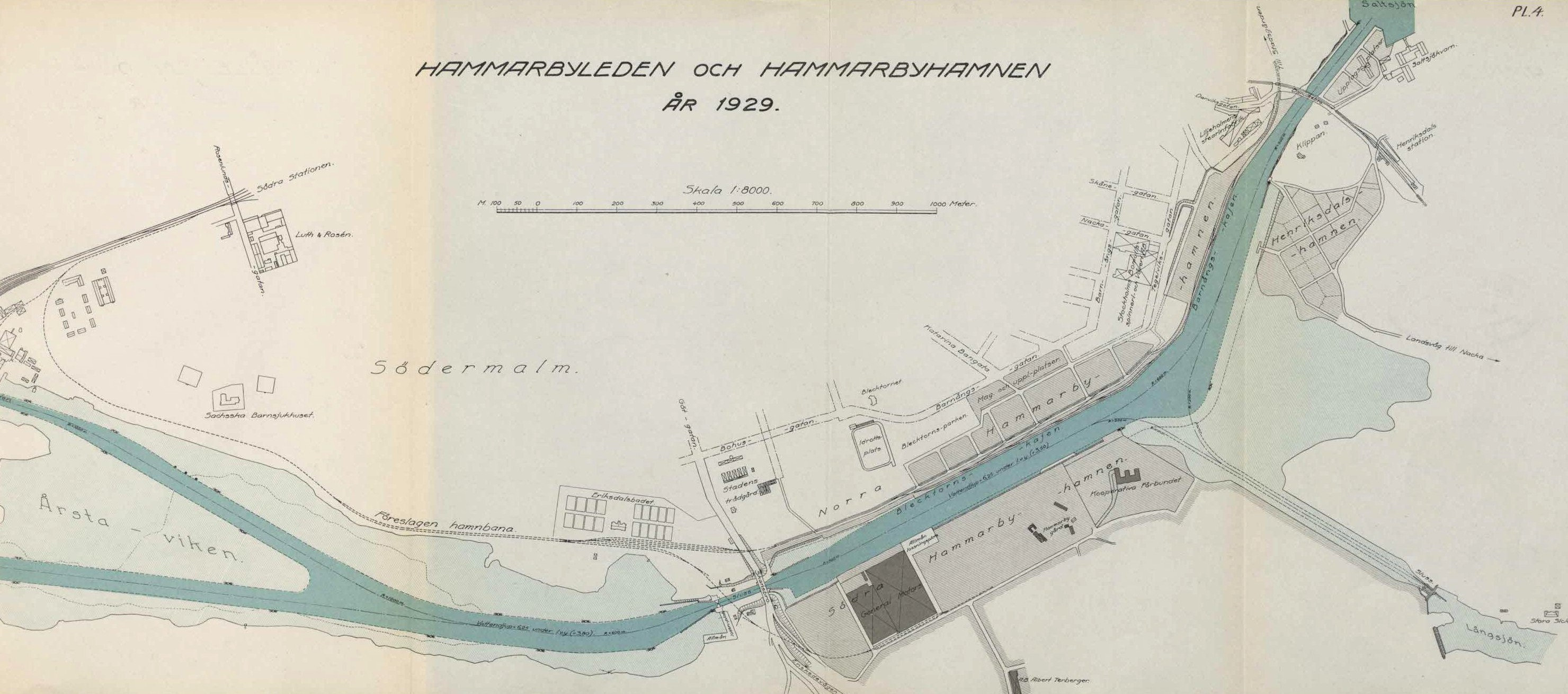 Hammarbyleden och Hammarbyhamnen 1929